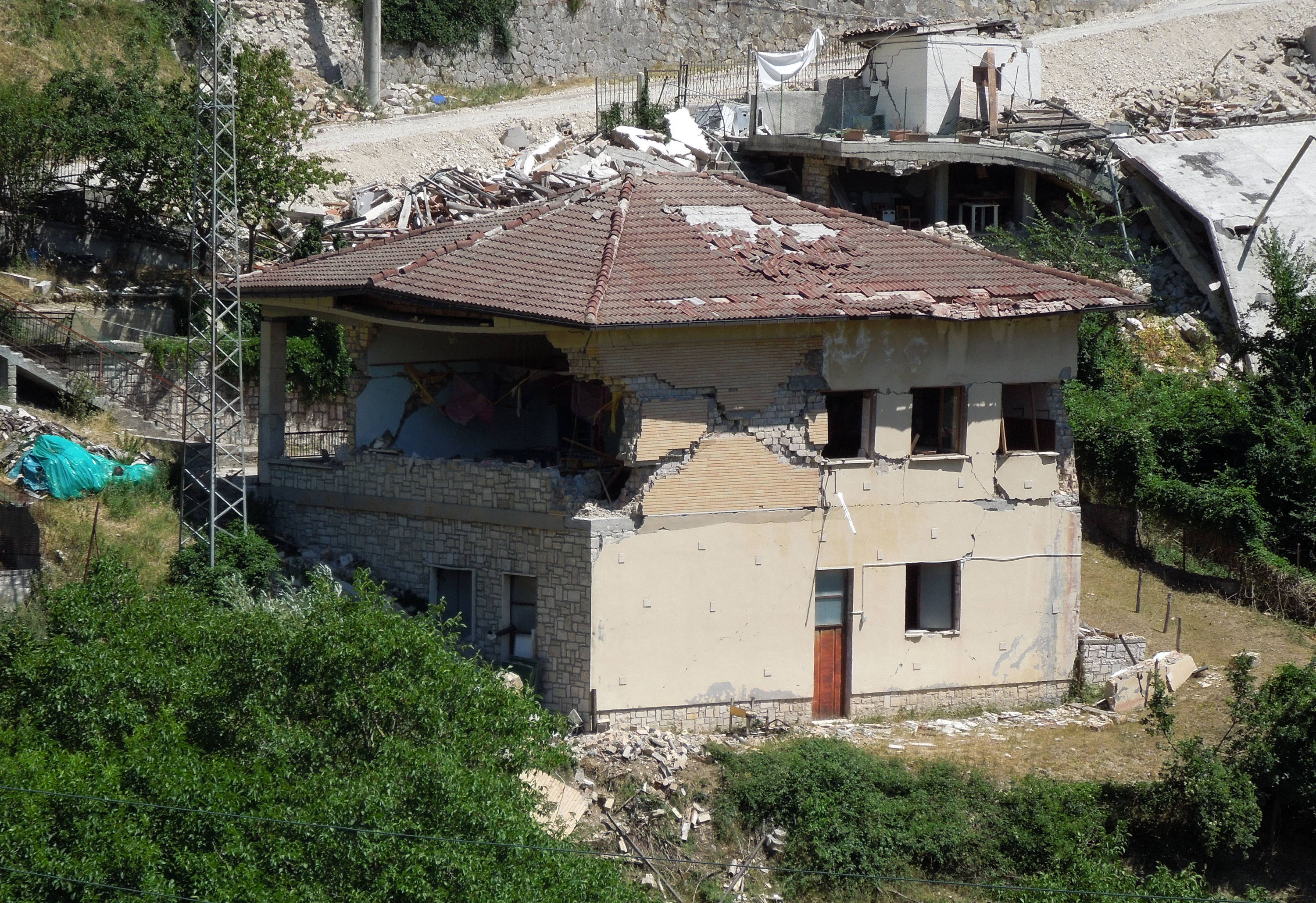 Edifico della ex scuola elementare del paese di Pescara del Tronto in provincia di Ascoli Piceno. L'immagine è stata scattata all'interno della zona rossa il 27 luglio 2017.